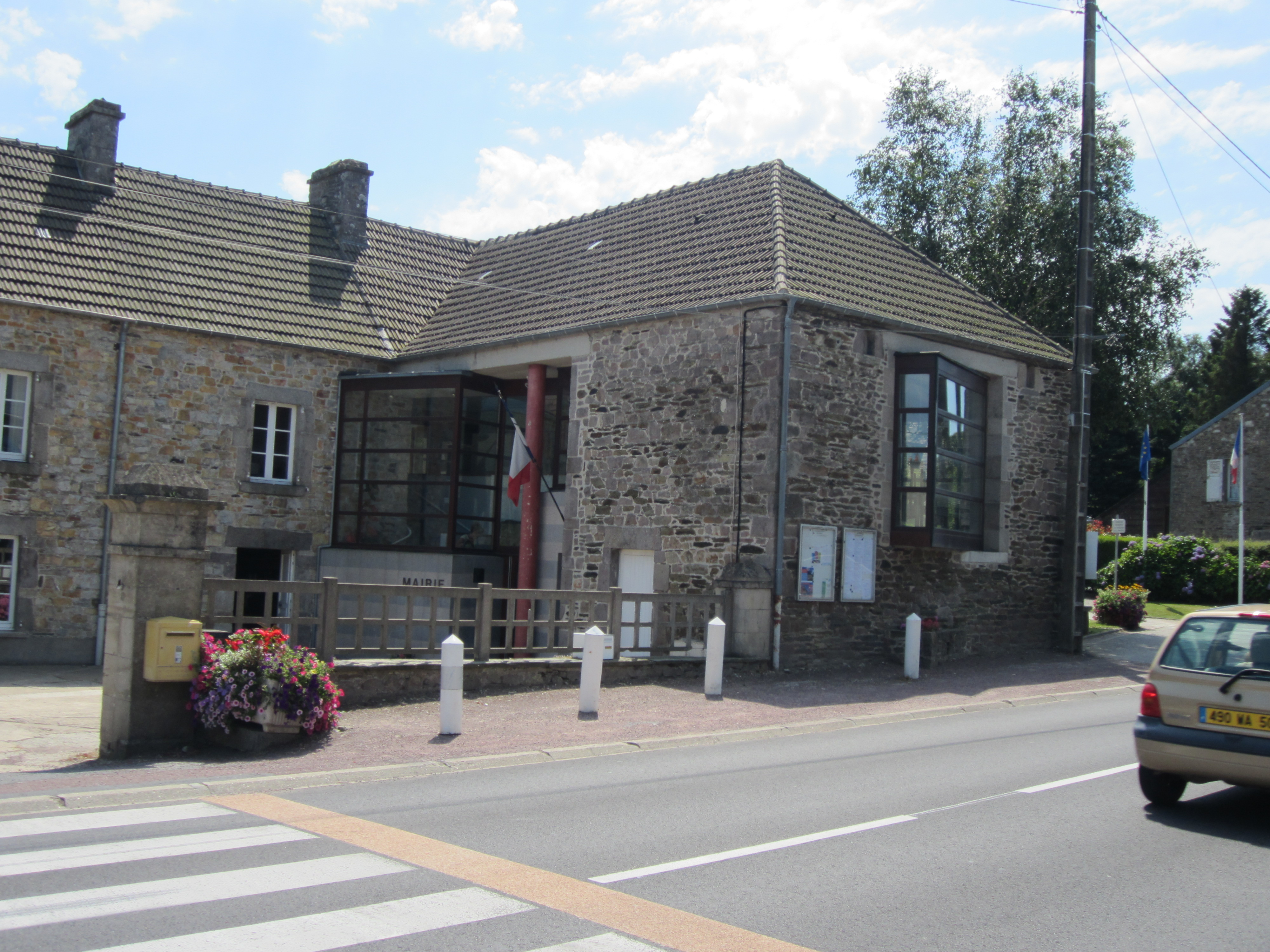 église Saint-Amand de Virandeville, Manche